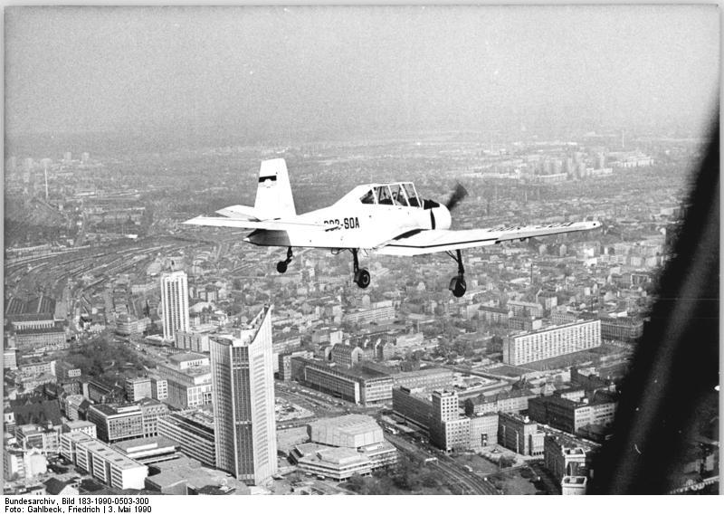 Leipzig, Flugzeug über Stadtzentrum ADN-Gahlbeck 3.5.90 Leipzig aus der Vogelperspektive - welch neuer Blickwinkel auf die Messestadt. Seit Anfang März bietet der Leipziger Agrarflughafen Mockau Rundflüge als Freizeitvergnügen an. Der Spaß ist teuer - zwölf Mark pro Mann-Frau und Minute, Kinder bis zwölf Jahre zahlen die Hälfte. Der Andrang ist groß, Voranmeldungen gehen über Wochen. Die Rundflüge sind erste Schritte zu einem neuen Service, einem neuen Profil des kleinen Flugplatzes im Leipziger Norden, denn mit den politischen und ökonomischen Veränderungen im Lande wird sich auch die Agrar- und Forstfliegerei ändern. [Leipzig.- Agrarflugzeug vom Typ Let Z-37 Čmelák ("Hummel"; Kennung "DDR-SOA") über Stadtzentrum mit Universitätshochhaus]